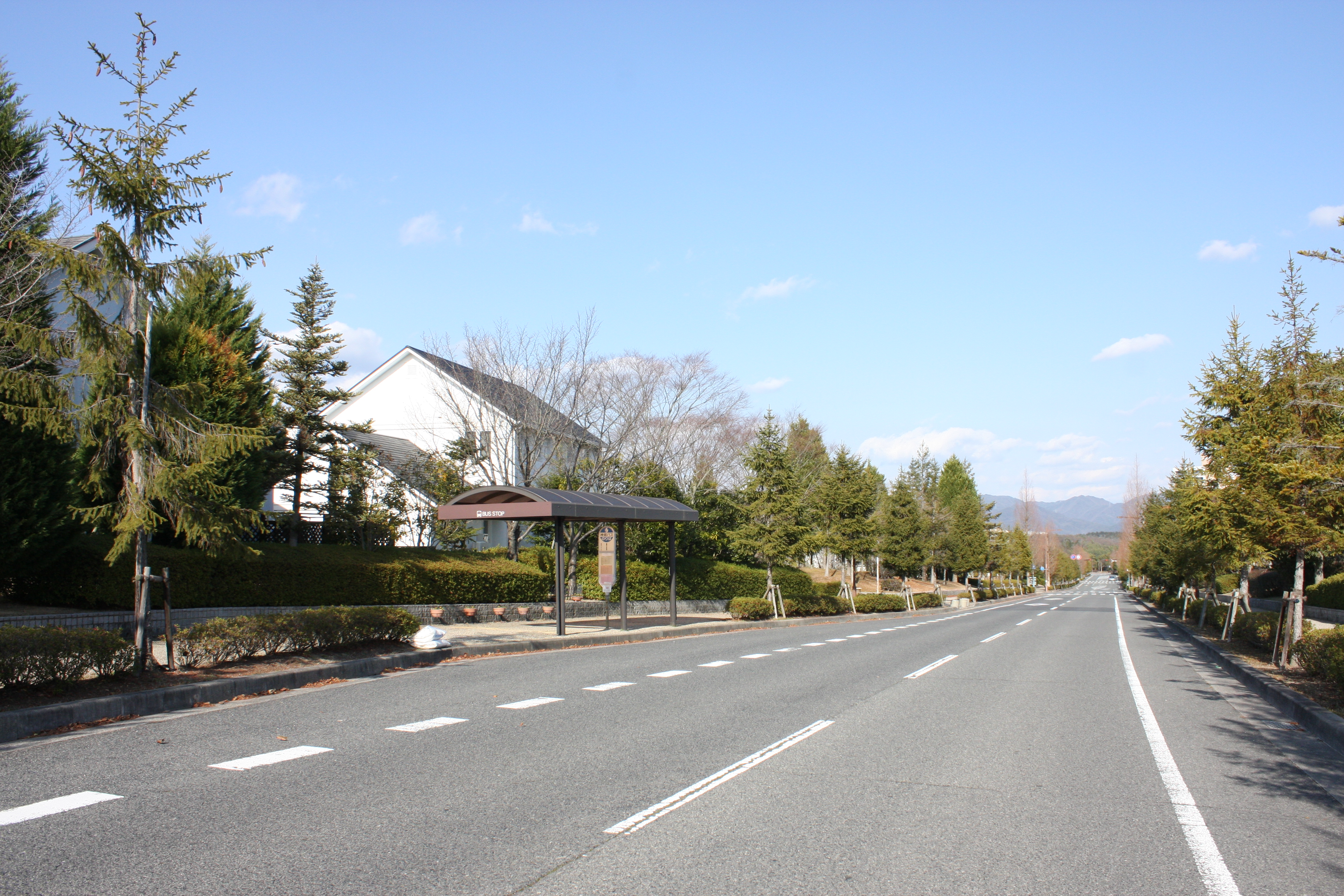 三田市 カルチャータウン